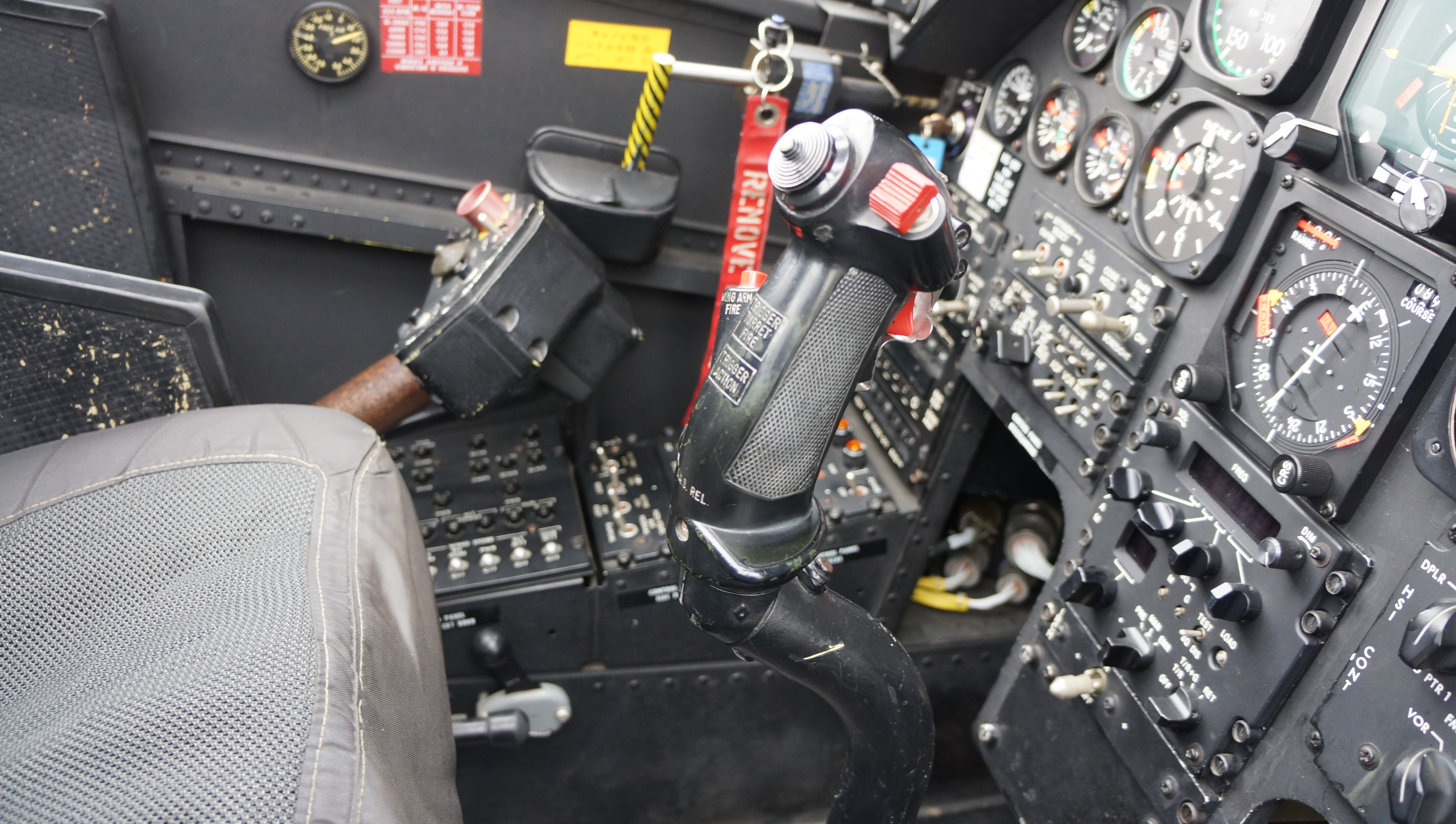 陸上自衛隊 AH-1S対戦車ヘリコプター（73455号機） 後席側サイクリック・スティック。2013年3月10日 OSAKA防衛・防災フェスティバルが開催されたアジア太平洋トレードセンターにて。